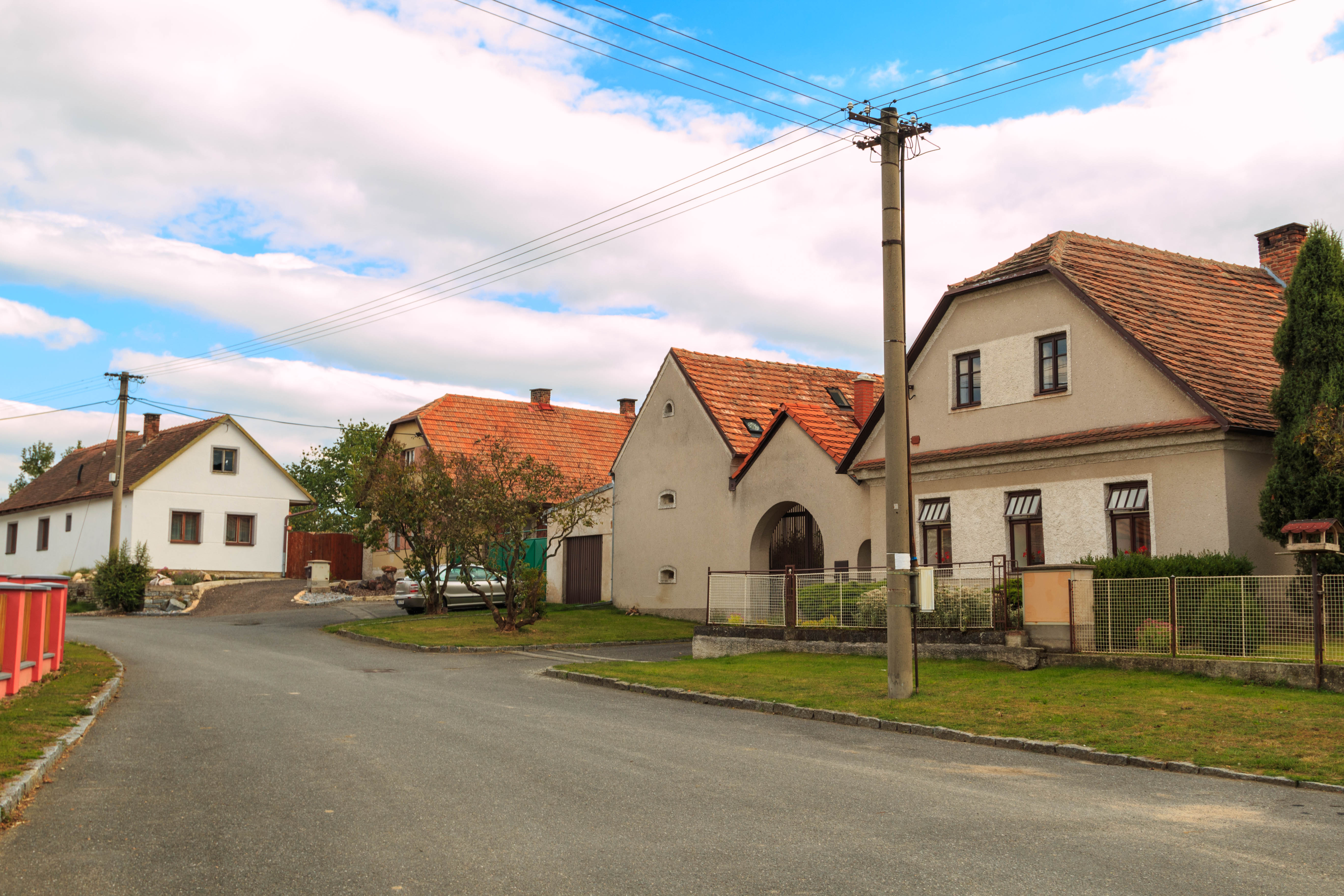 Jenišovice čp. 18